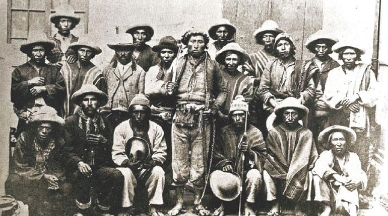 Grupo de campesinos liderados por Zárate Willka, que participó de la Guerra Federal de 1899.